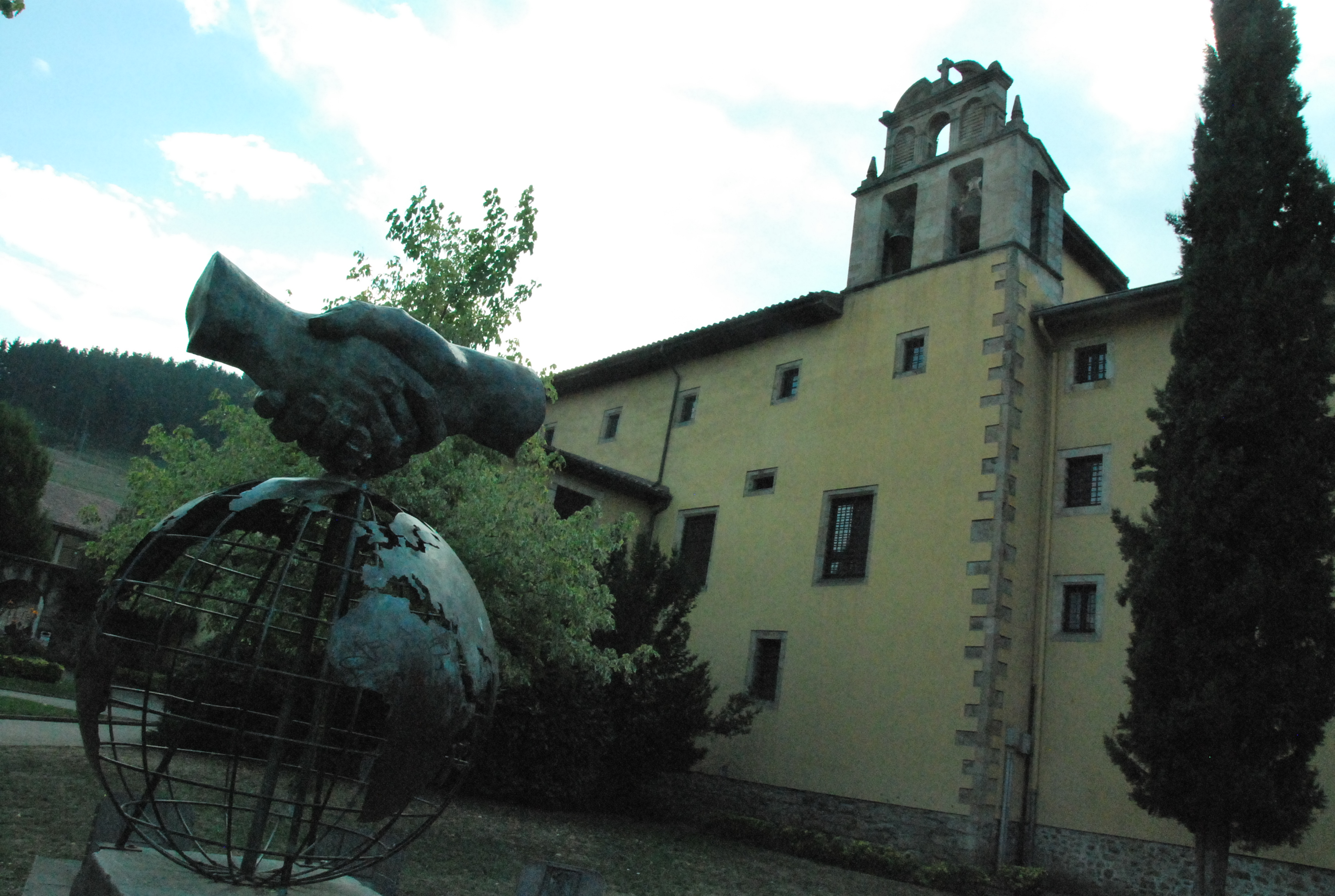 Oñatiko Santa Ana konbentua, orain areto bihutua. Aurrekaldean anaitzeen eskultura